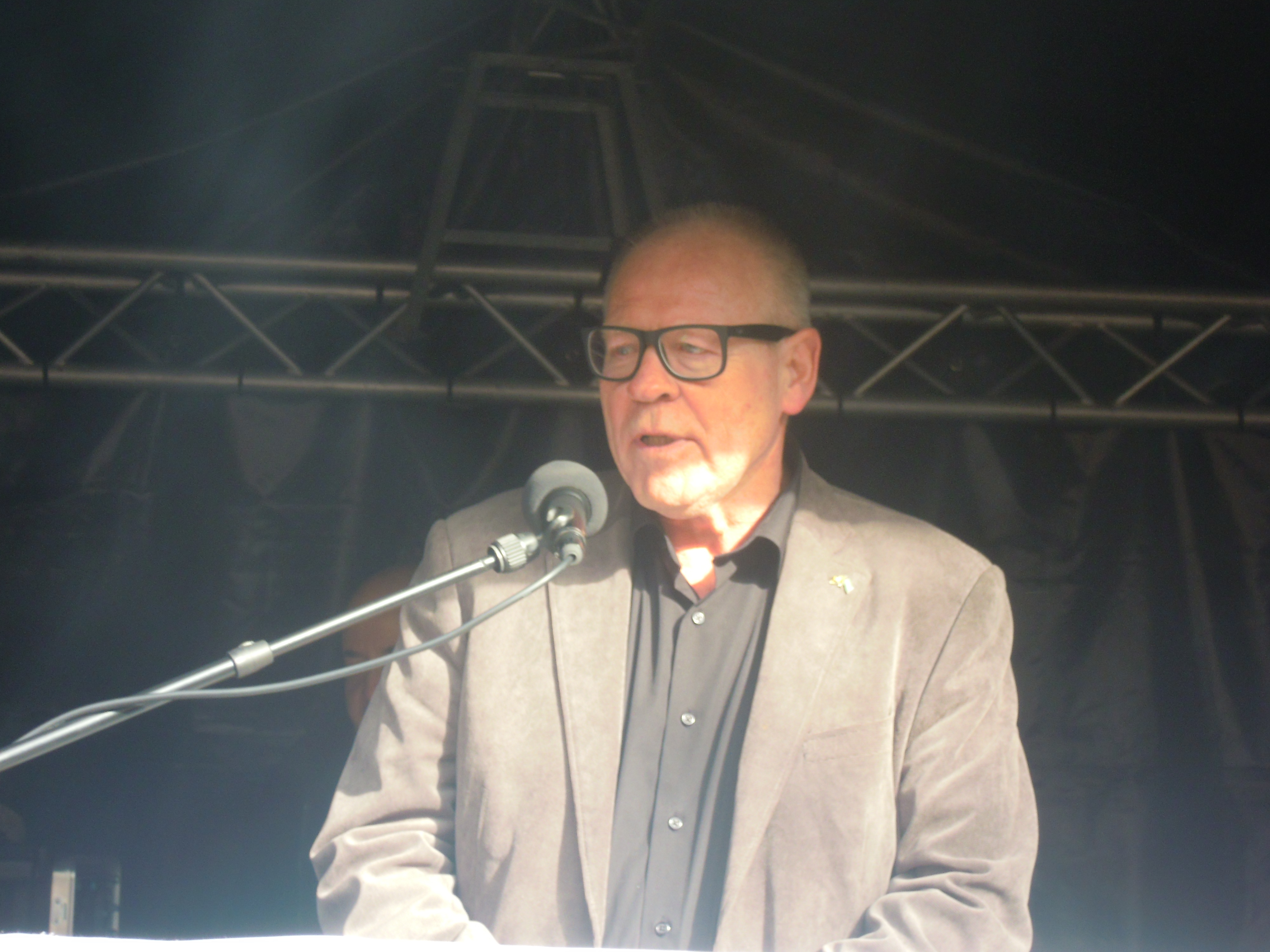 Dries Mosch bij de herdenking van de moord op Pim Fortuyn in Rotterdam